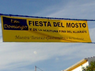 Banderola anunciando la Fista del mosto de Umbrete (2009)